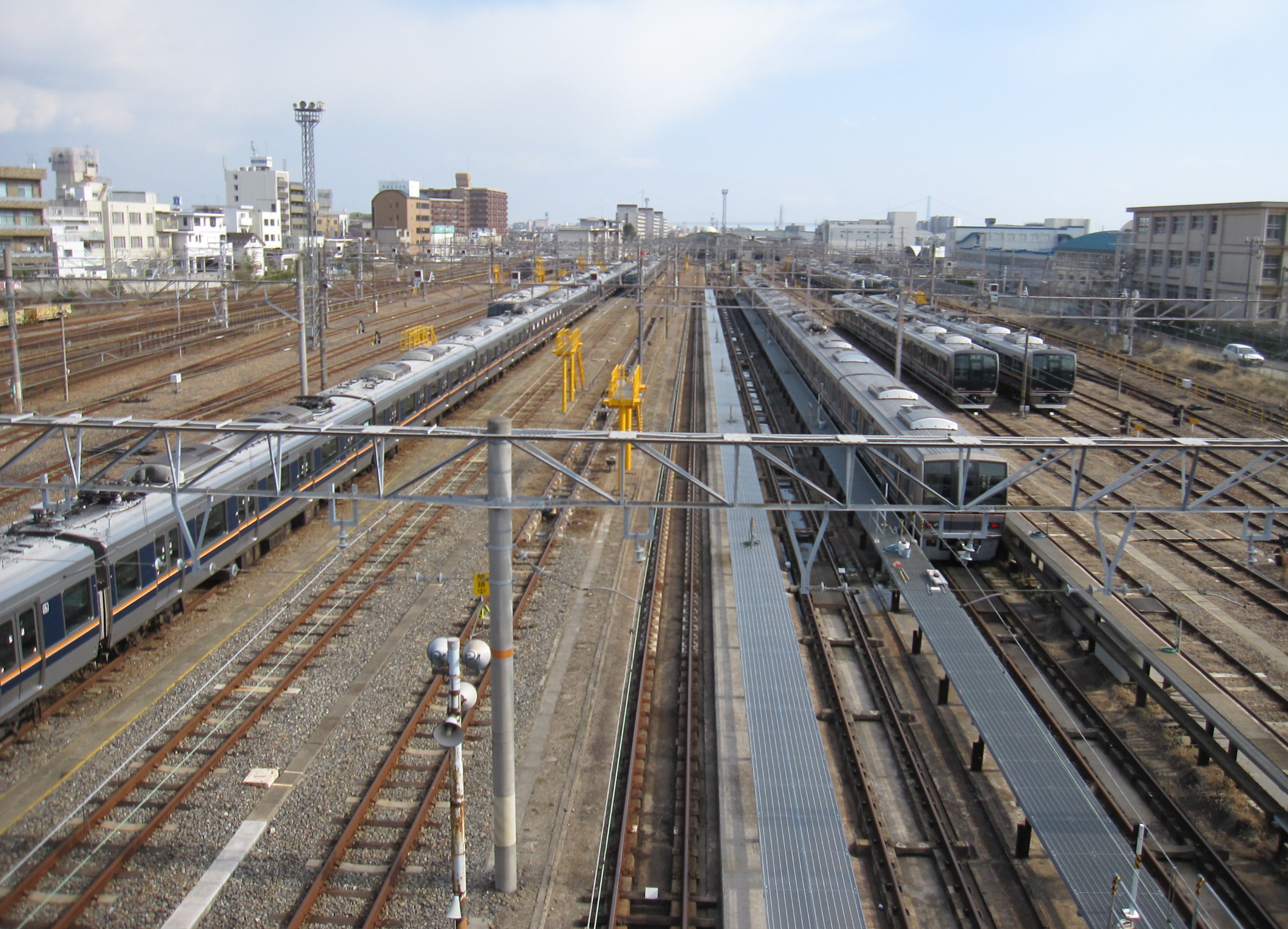 網干総合車両所明石支所構内